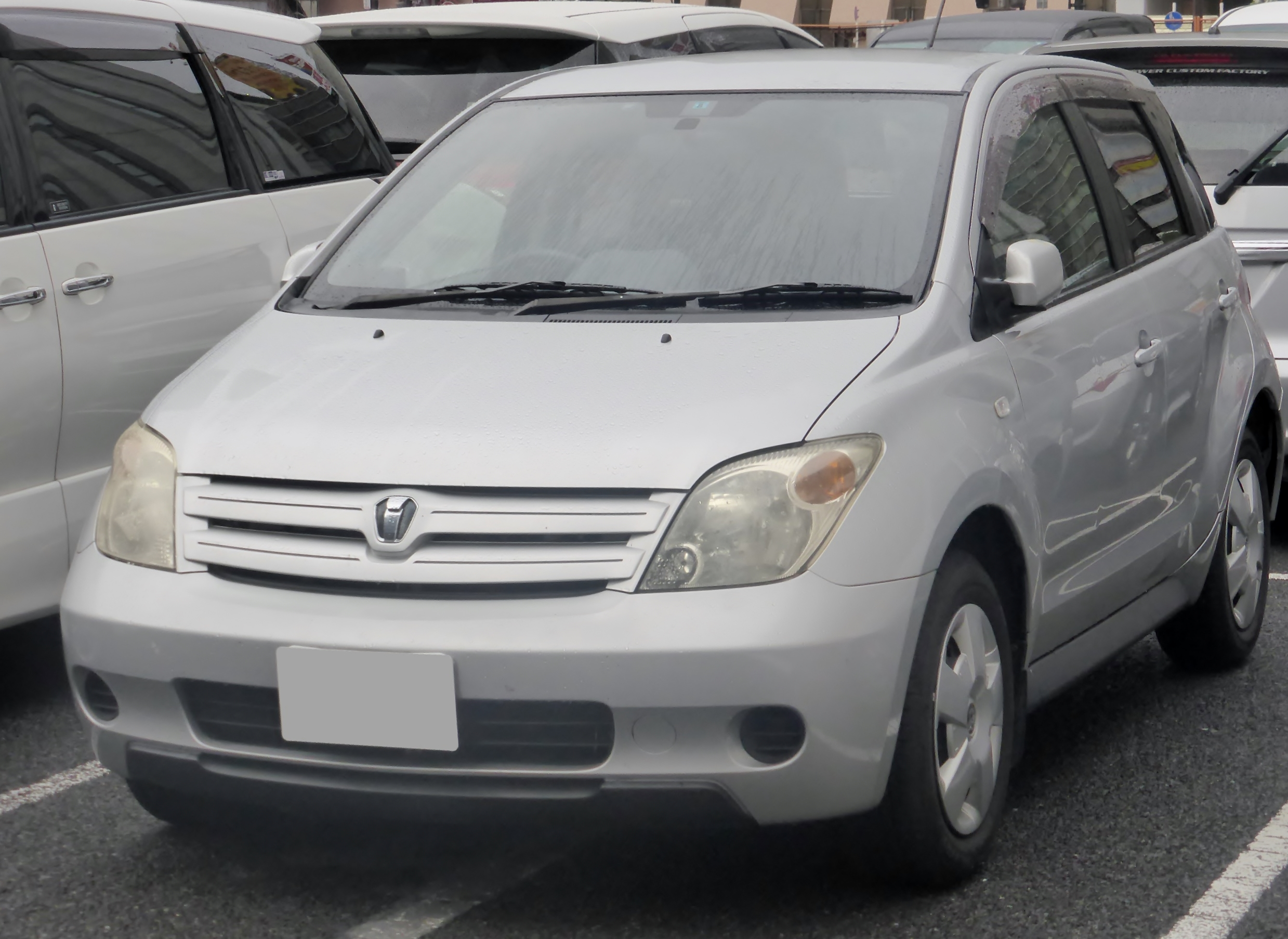 UA-NCP60型トヨタ・ist 1.3Fをフロントから撮影。